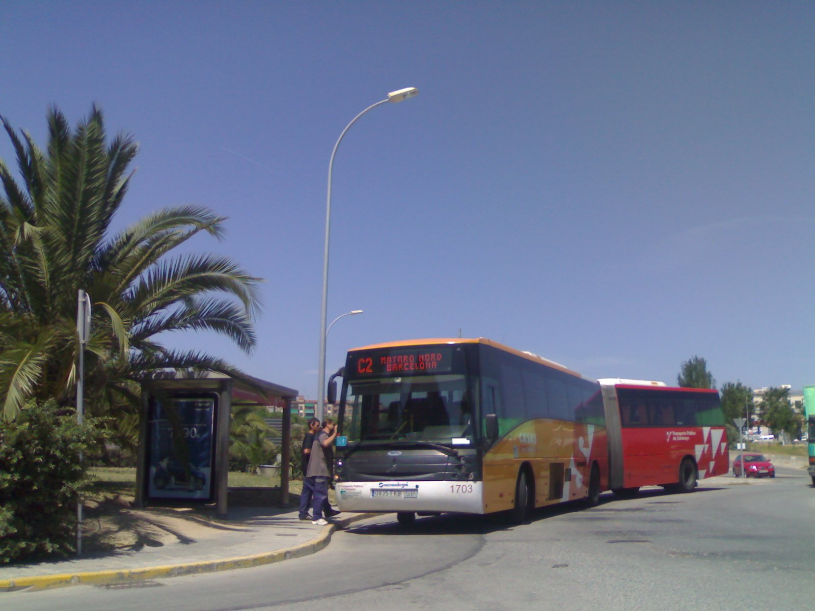 Companyia Casas al Maresme